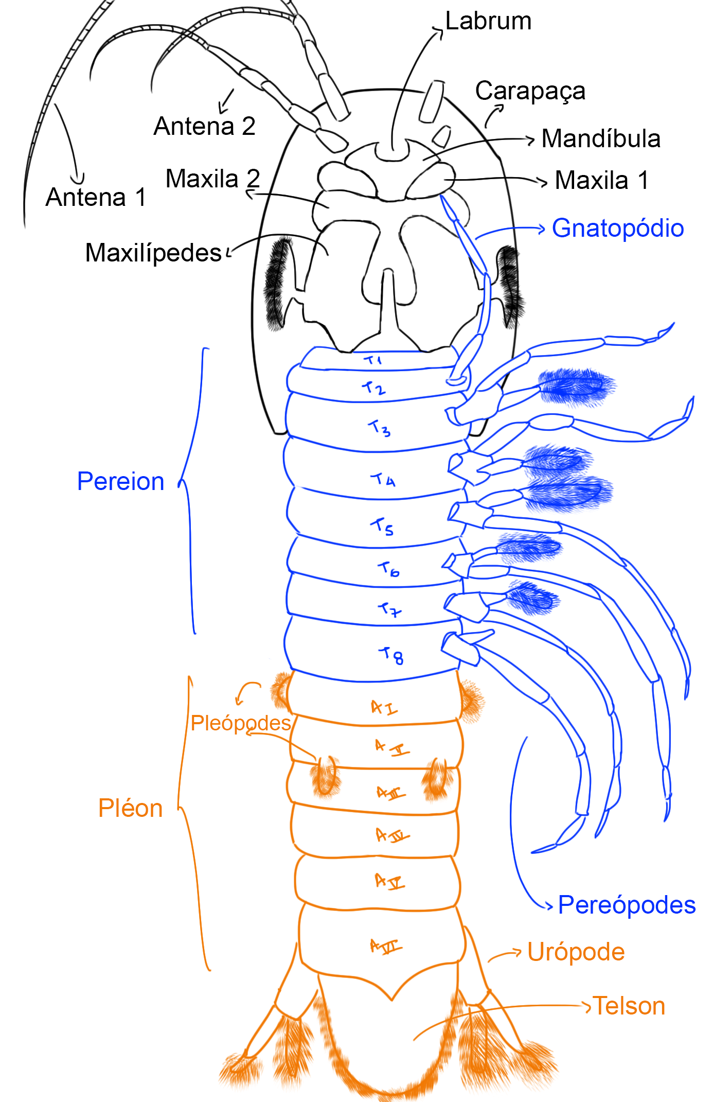 Esquema em vista ventral de Thermosbaenacea, com apêndices aos pares (desenhado em apenas um dos lados). T1 a T8 referente aos toracômeros. AI a AVI referente aos pleonitos.